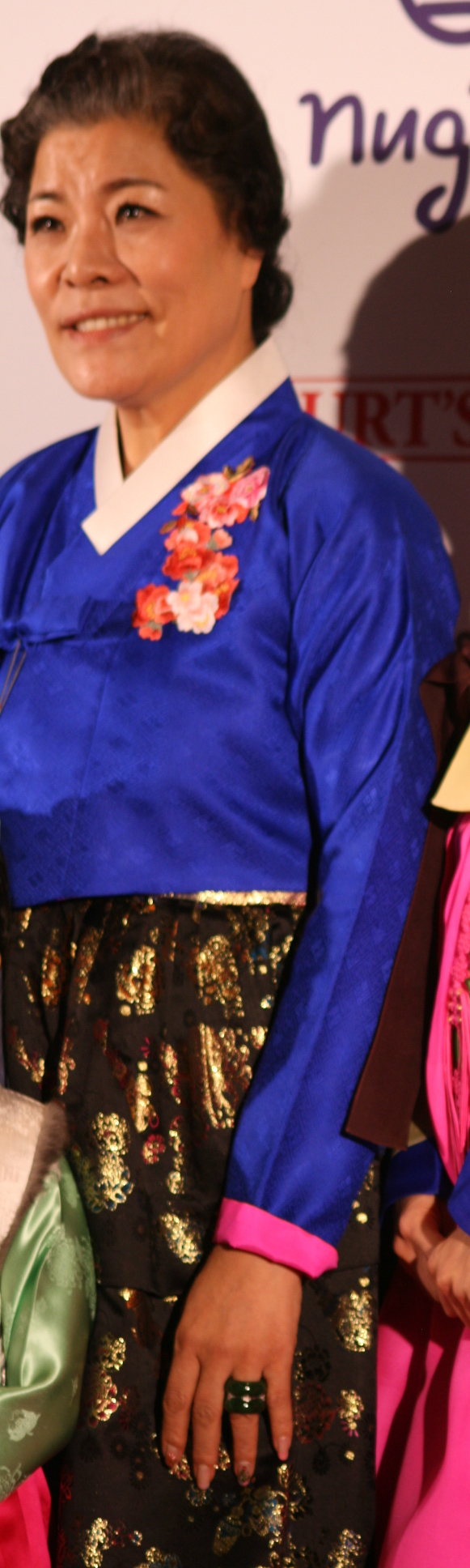 2011 라이프 스타일 어워드